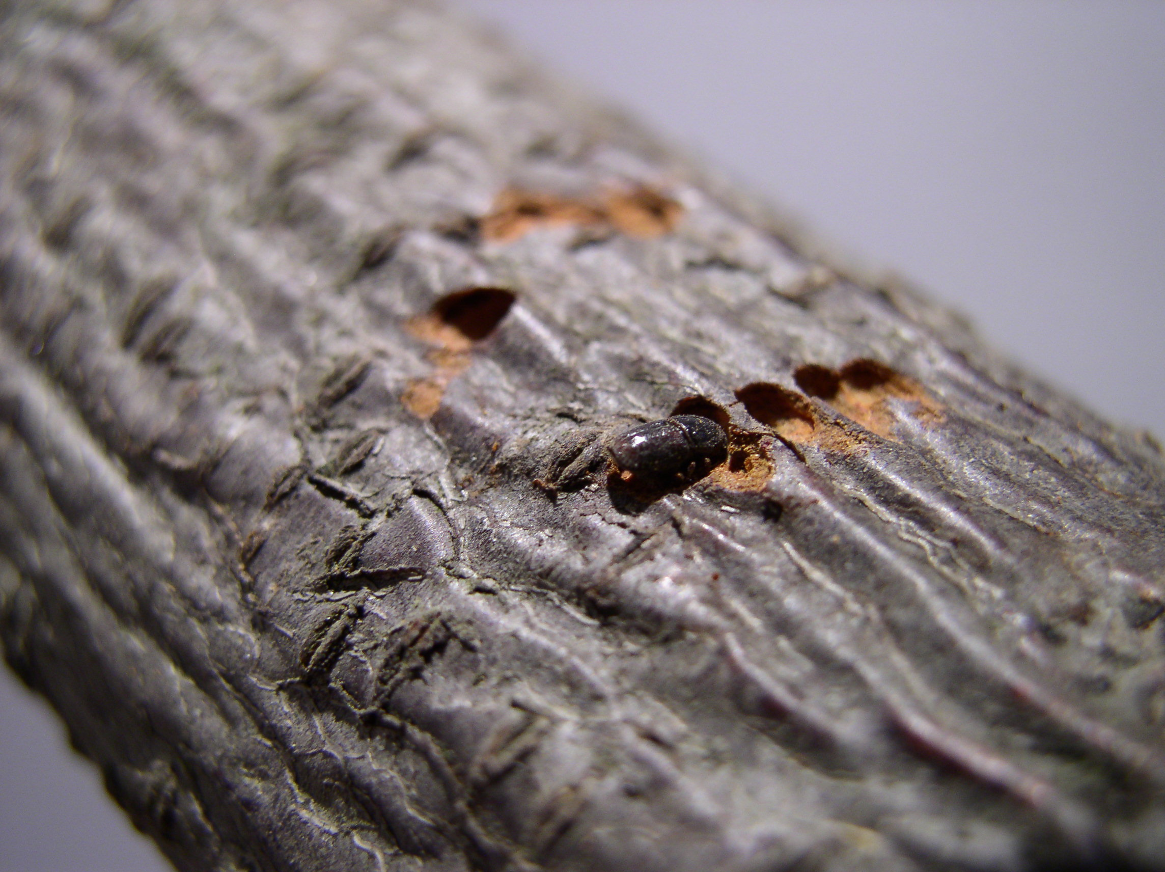 Kornik (pl) Bark beetle (eng) by Rafal Konieczny, 2005, Wroclaw, Poland